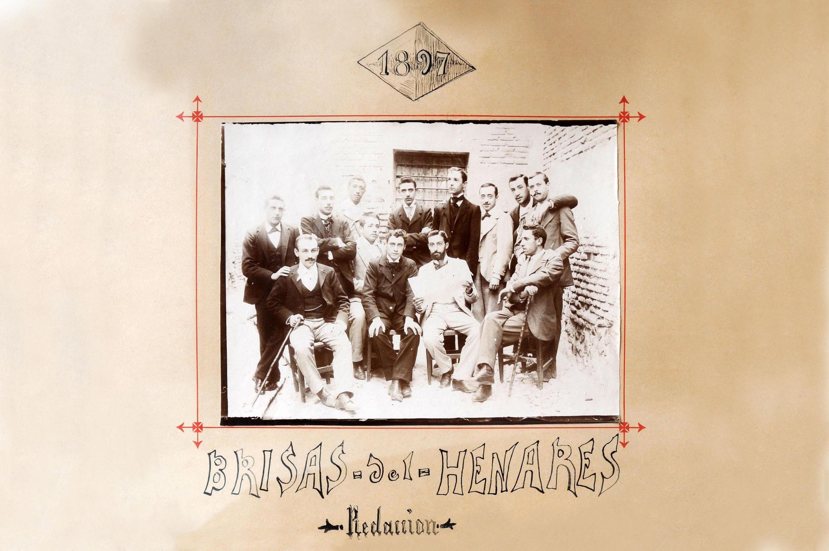 Redacción de la revista satírica "Brisas del Henares" publicada en Alcalá de Henares (Comunidad de Madrid - España) entre el 2 de septiembre de 1897 y el 2 de marzo de 1898 (20 números en total) en la Imprenta de Federico García. Su sede administrativa se localizaba en la calle Coches, nº 10 (actual calle Cardenal Cisneros, nº 12). Entre sus fundadores estaban: Manuel Azaña Díaz, José María Vicario, Joaquín Creagh Balló, Marcelino de Pedro, Jesús de la Plaza, Francisco Huerta, Fausto Martínez del Arco y Fernando Martínez.[1]